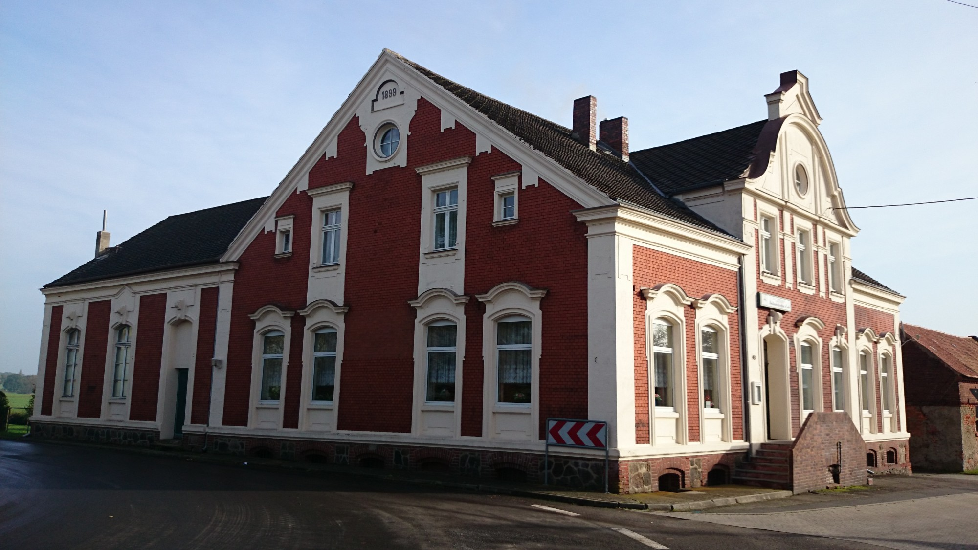 1899 erbaute Gaststätte in Sellendorf